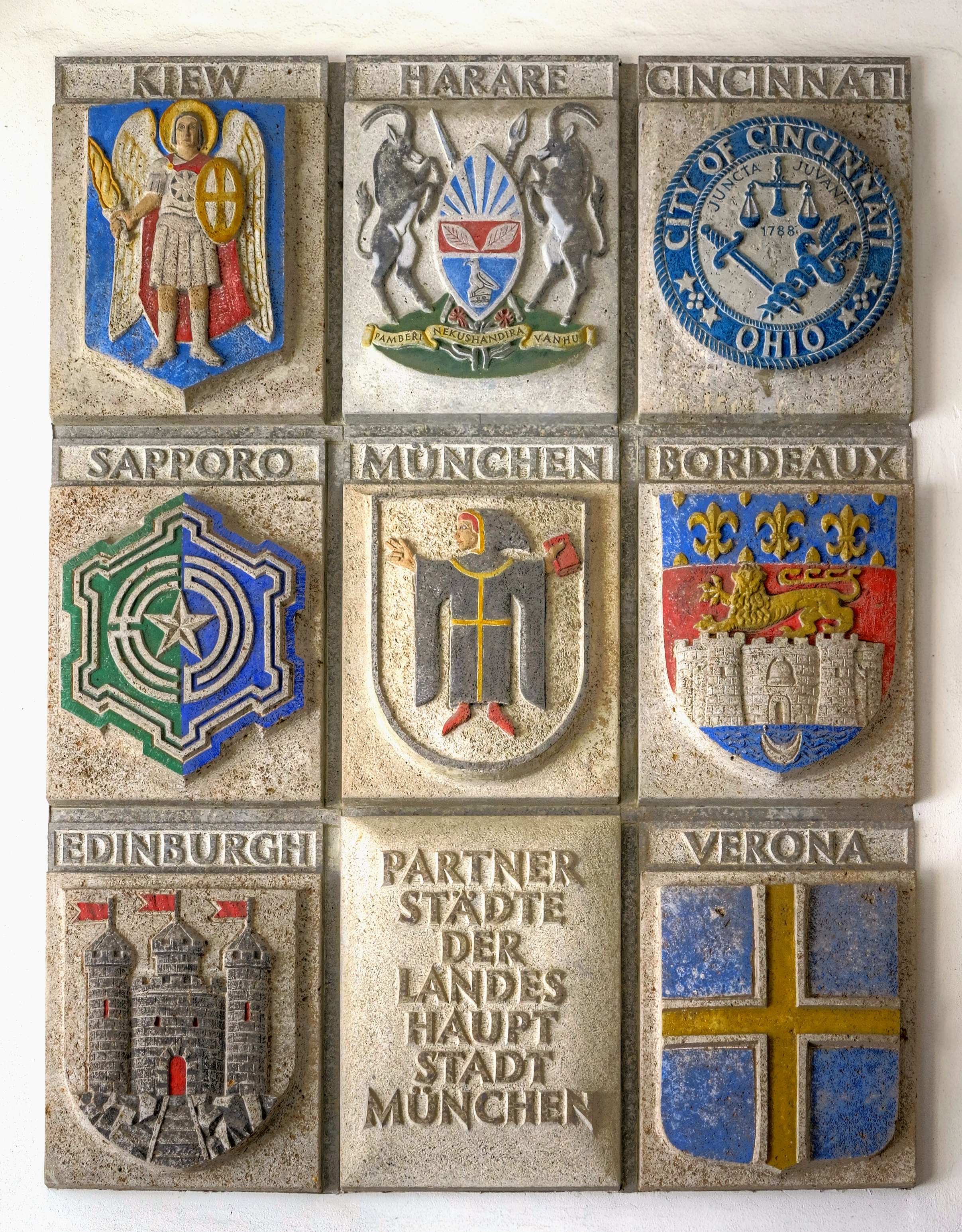 Deutschland, Bayern, München, Neues Rathaus am Marienplatz, Wandskulptur der Partnerstädte der Landeshauptstadt München